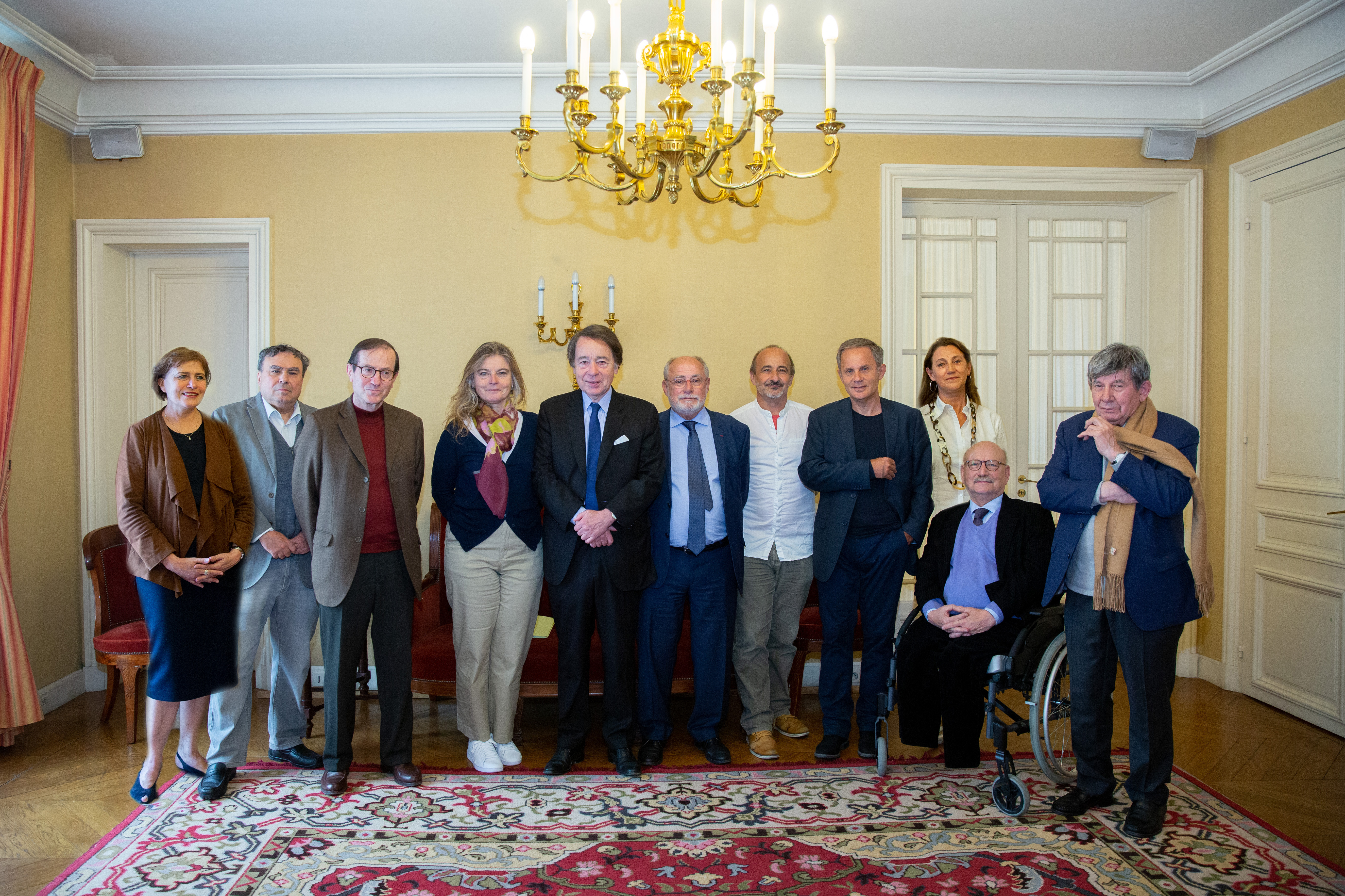 Membres du Jury - 2019